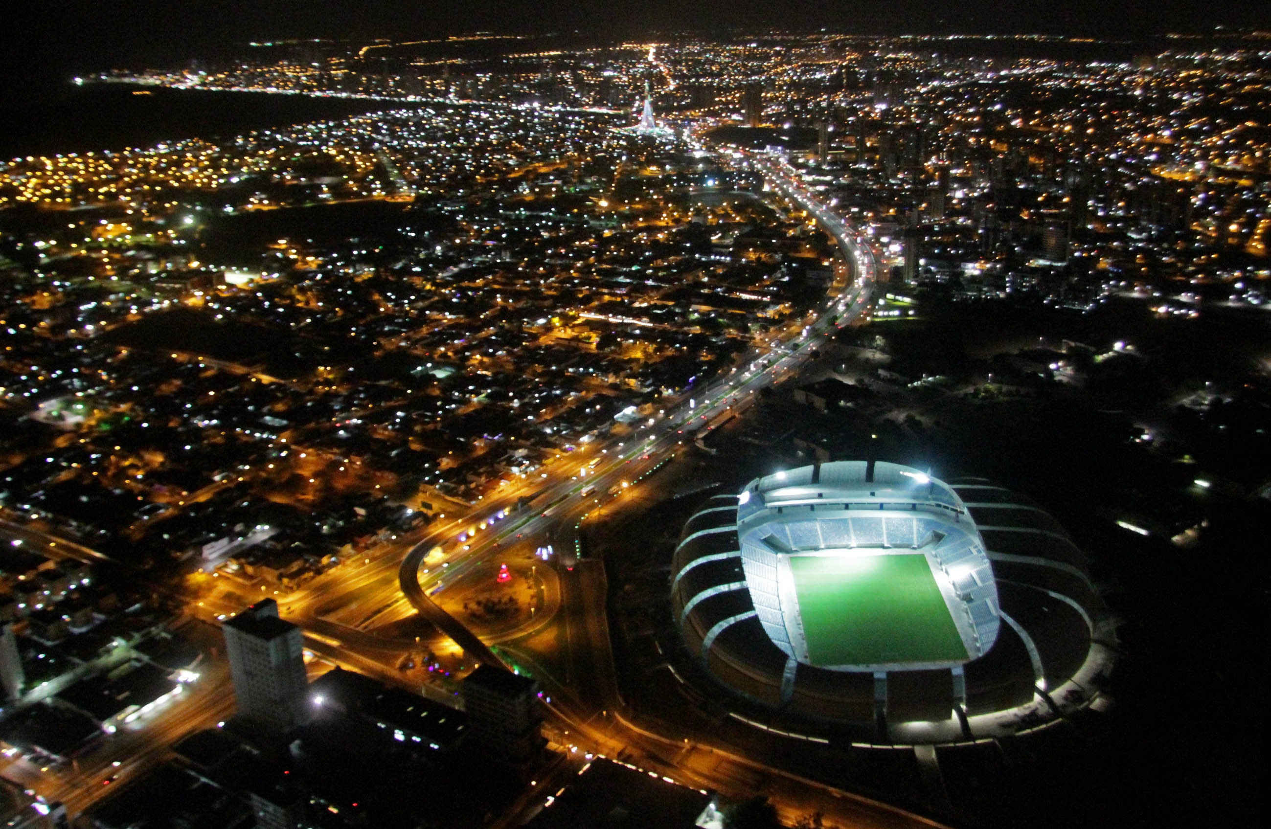 Estádio Arena das Dunas, Natal, Brasil, em 31 de dezembro de 2013, em inauguração simbólica.